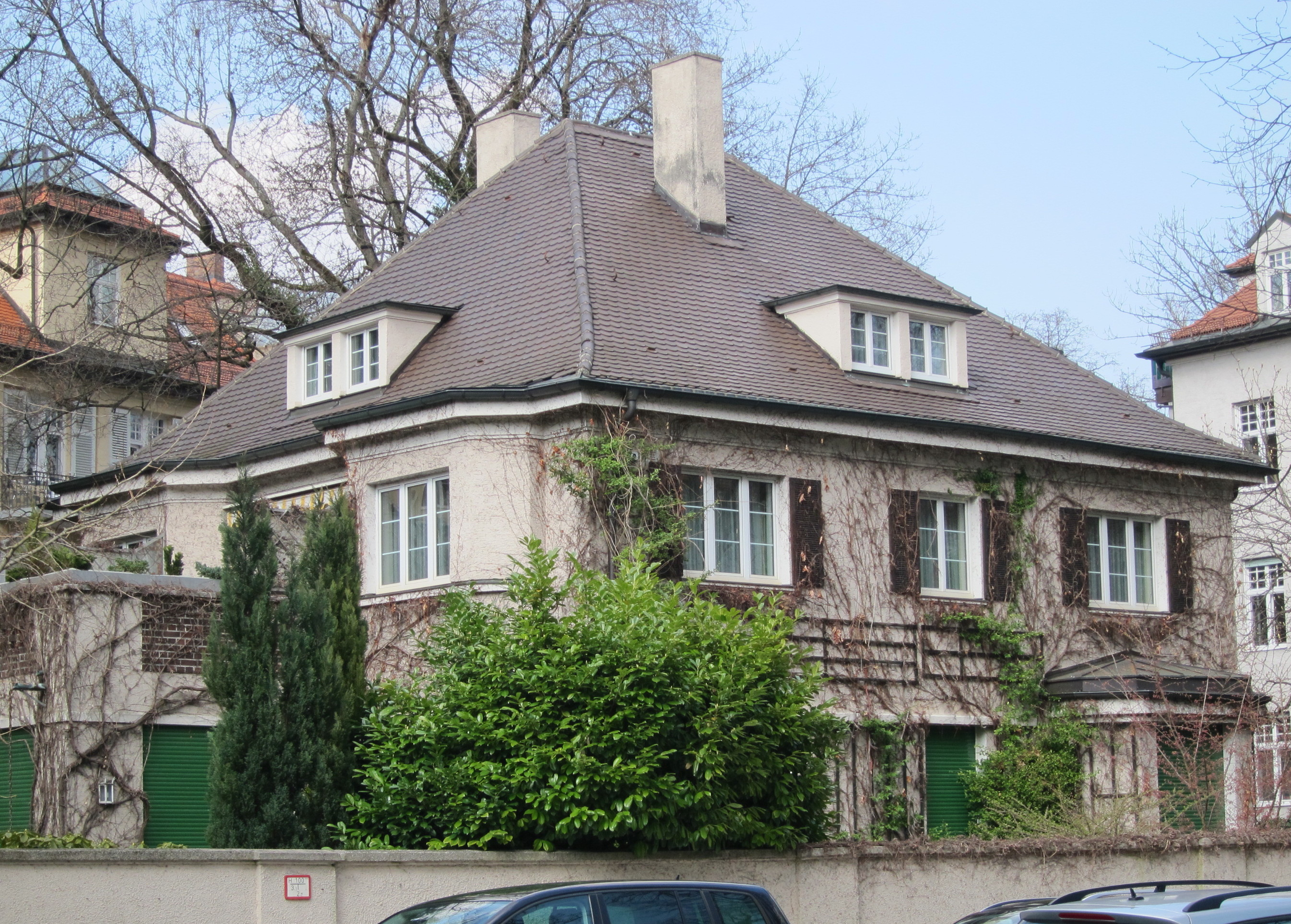 Kolbergerstraße 5; Walmdachvilla, historisierend, 1924 von Max Niggl.